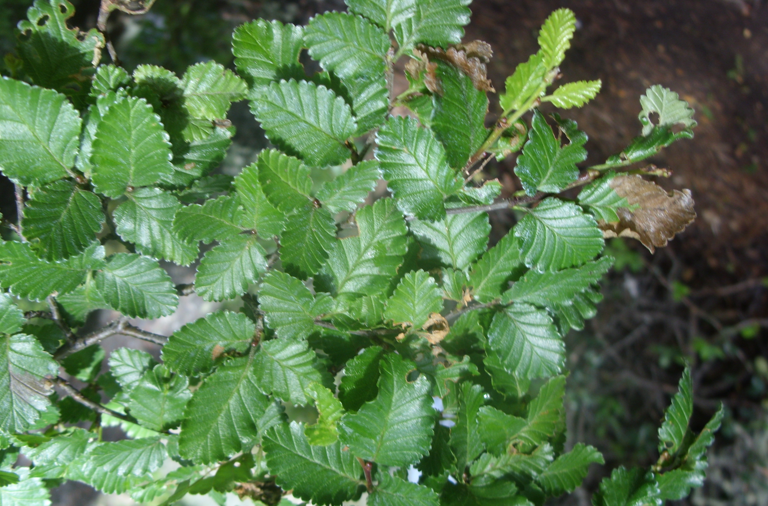 Rama de lenga (Nothofagus pumilio) en